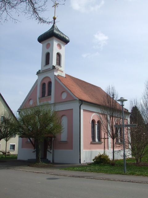 Erlenmoos, Teilort Oberstetten, Marienkapelle (errichtet 1883)